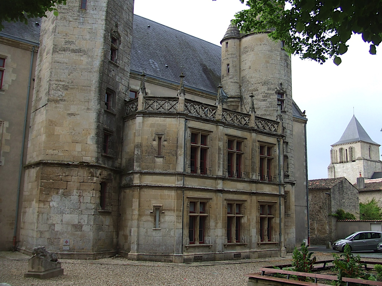 L’hôtel de Ménoc, édifice composite aux tours d’escaliers de style gothique flamboyant Cet édifice est composé de deux tours d’escaliers datant de la 2e moitié du XVe siècle, de style gothique flamboyant et d’un corps de bâtiment du XIXe siècle.